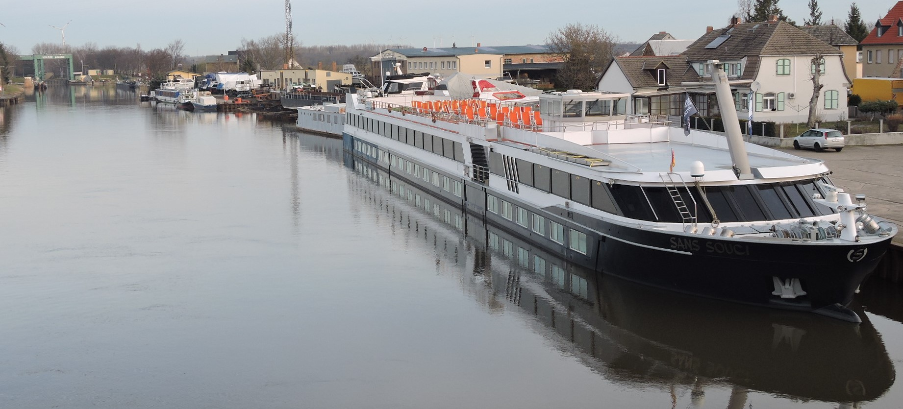 Kreuzfahrtschiff Sans Souci